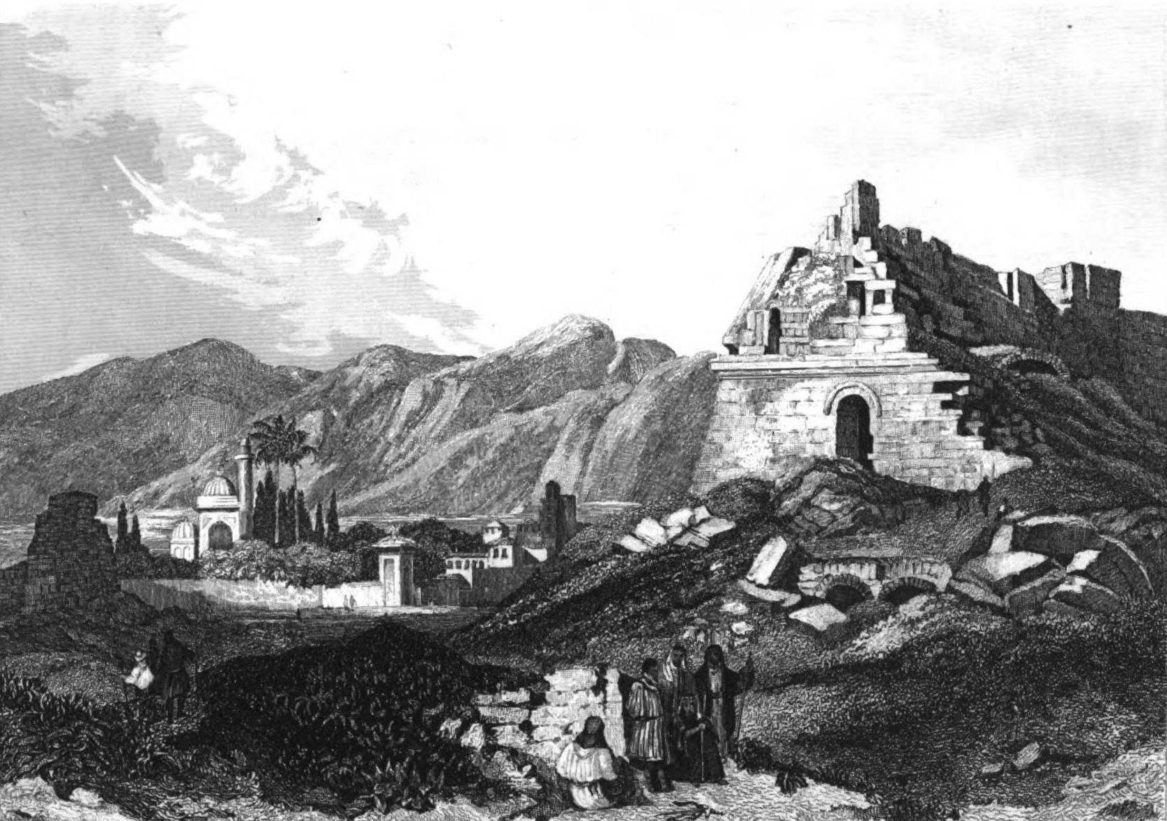 Miletus